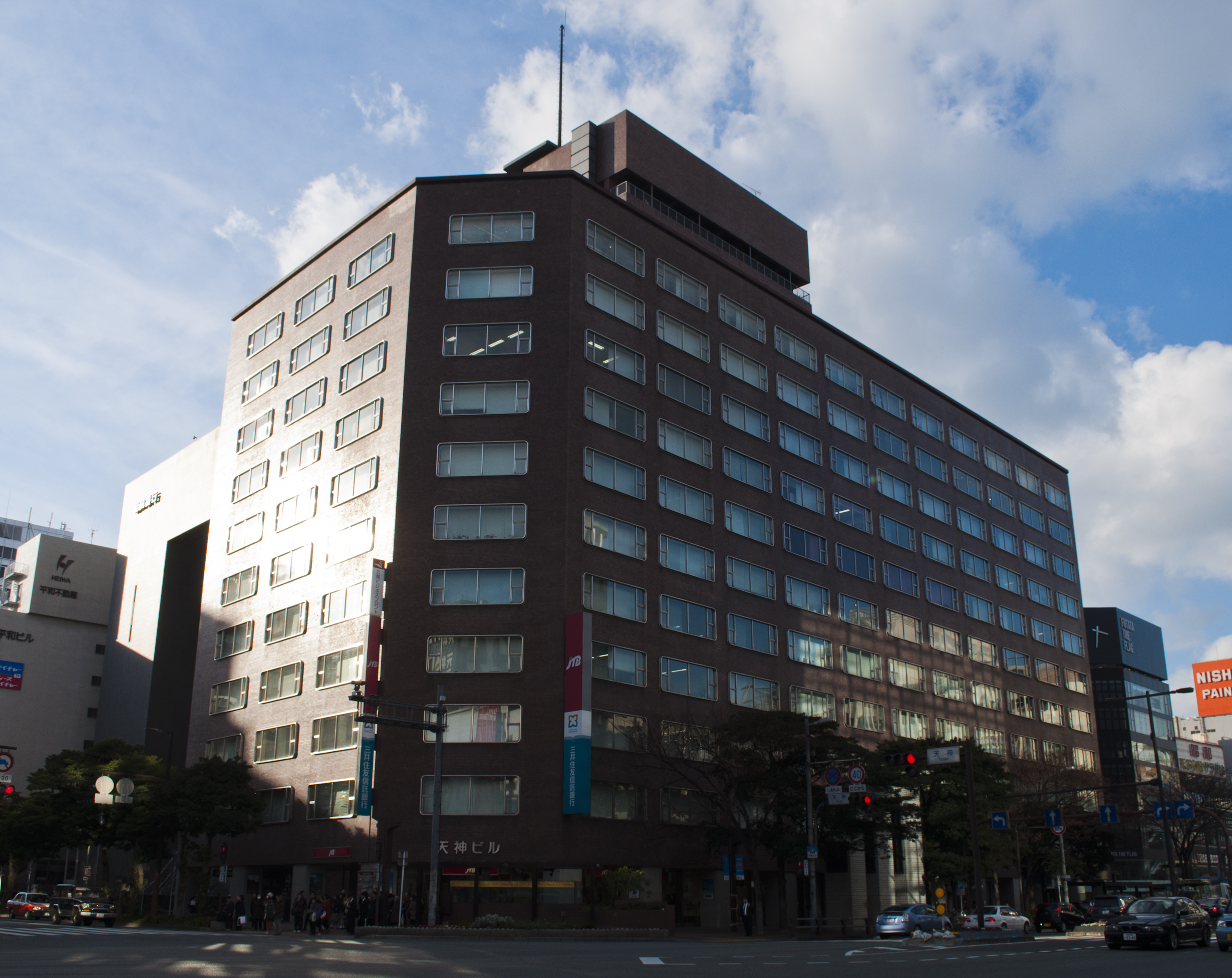 福岡市天神に存在する天神ビル。